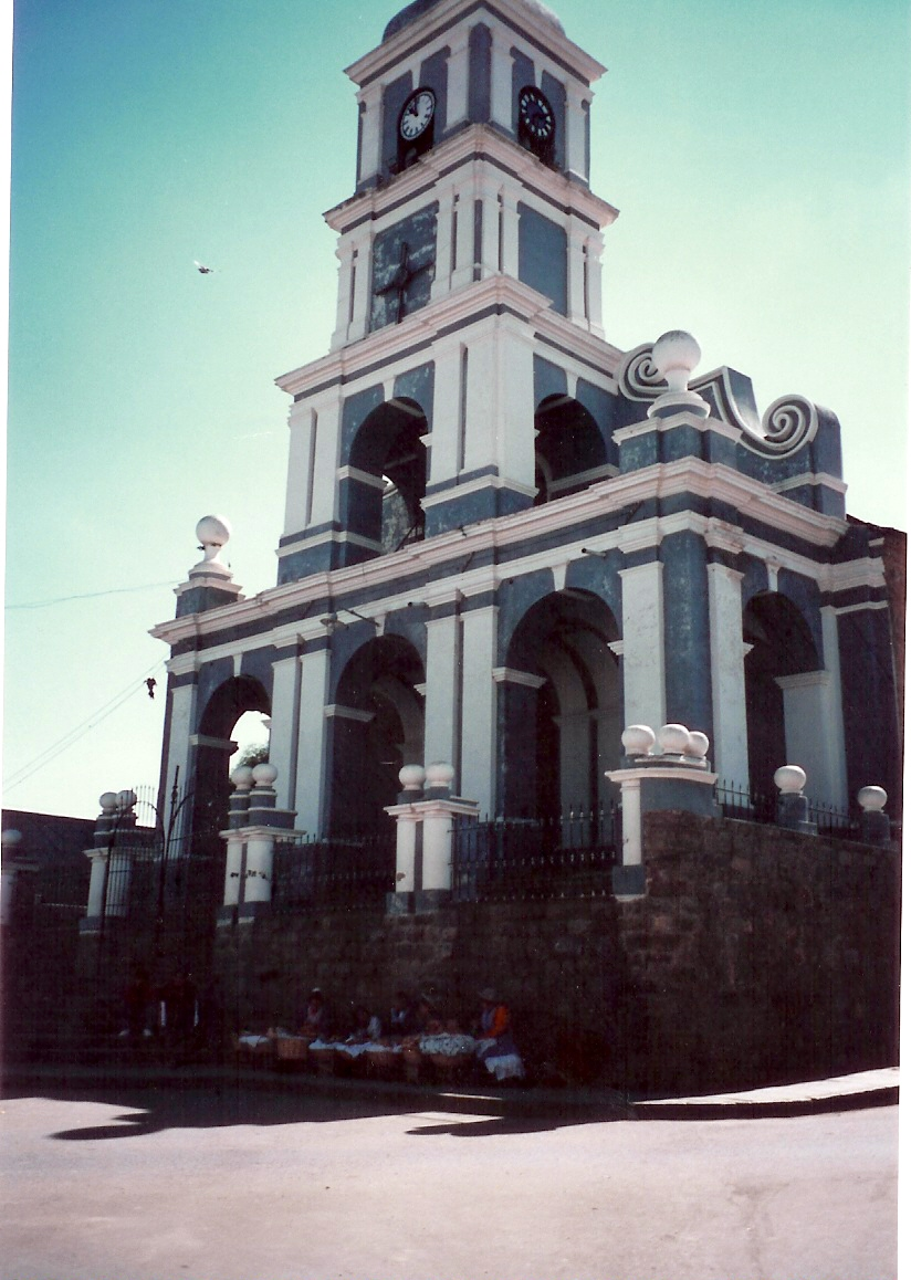 Iglesia de San Roque. Tariga. Bolivia Fotografía propia. Año 1996